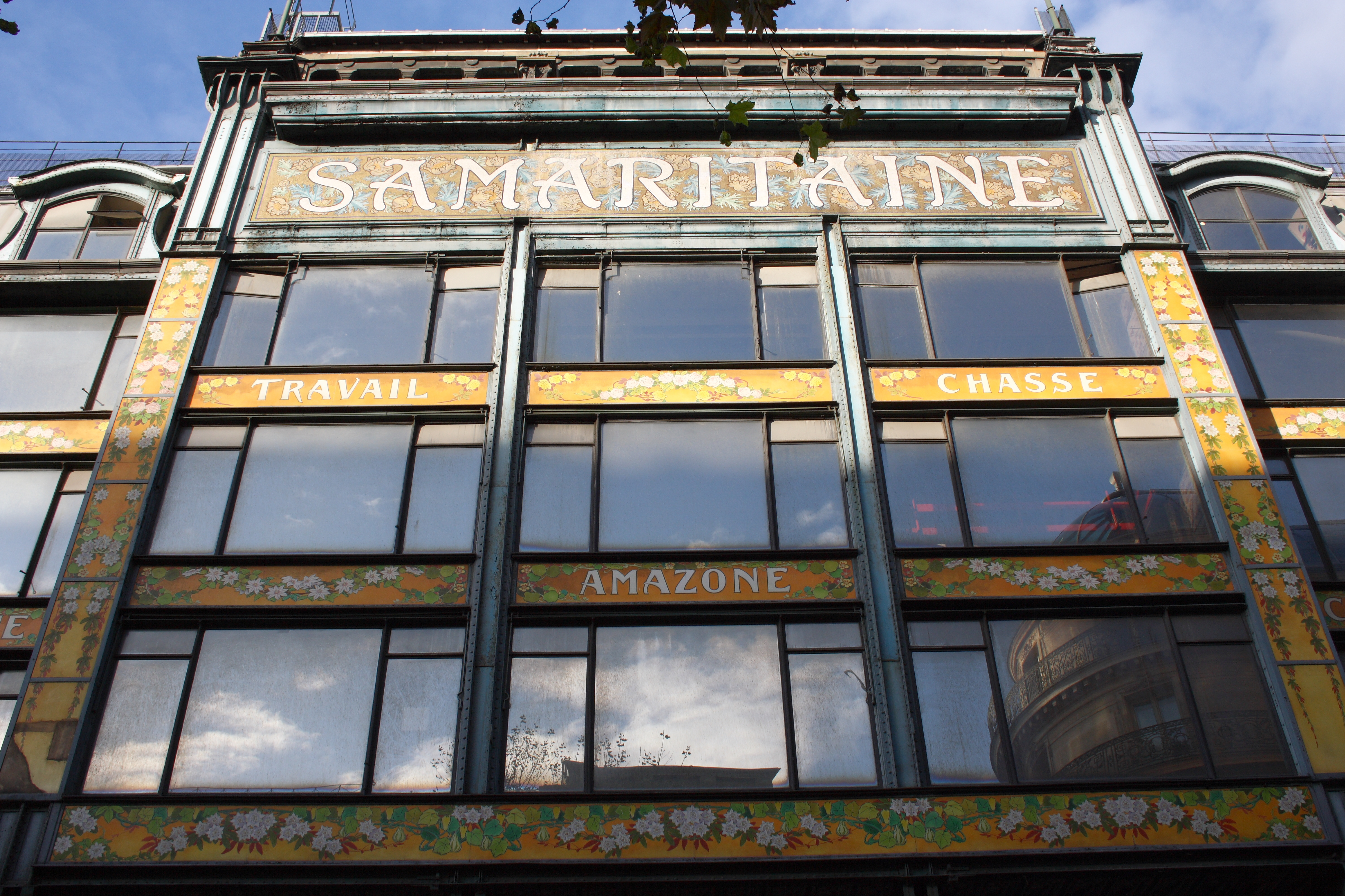 Ehemaliges Kaufhaus La Samaritaine, Magasin 2 (erster Bau), Quai du Louvre/Rue de la Monnaie im 1. Arrondissement von Paris, 1905-07 von Frantz Jourdain gebaut, mit Francis Jourdain (Dekor), Eugène Grasset (Malerei), Édouard Schenck (Eisen) und Alexandre Bigot (Keramik)